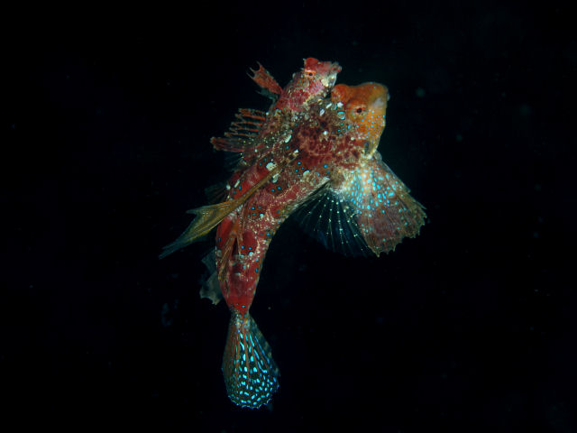 ヤマドリ Synchiropus ijimae (synonym: Neosynchiropus ijimai * [1]